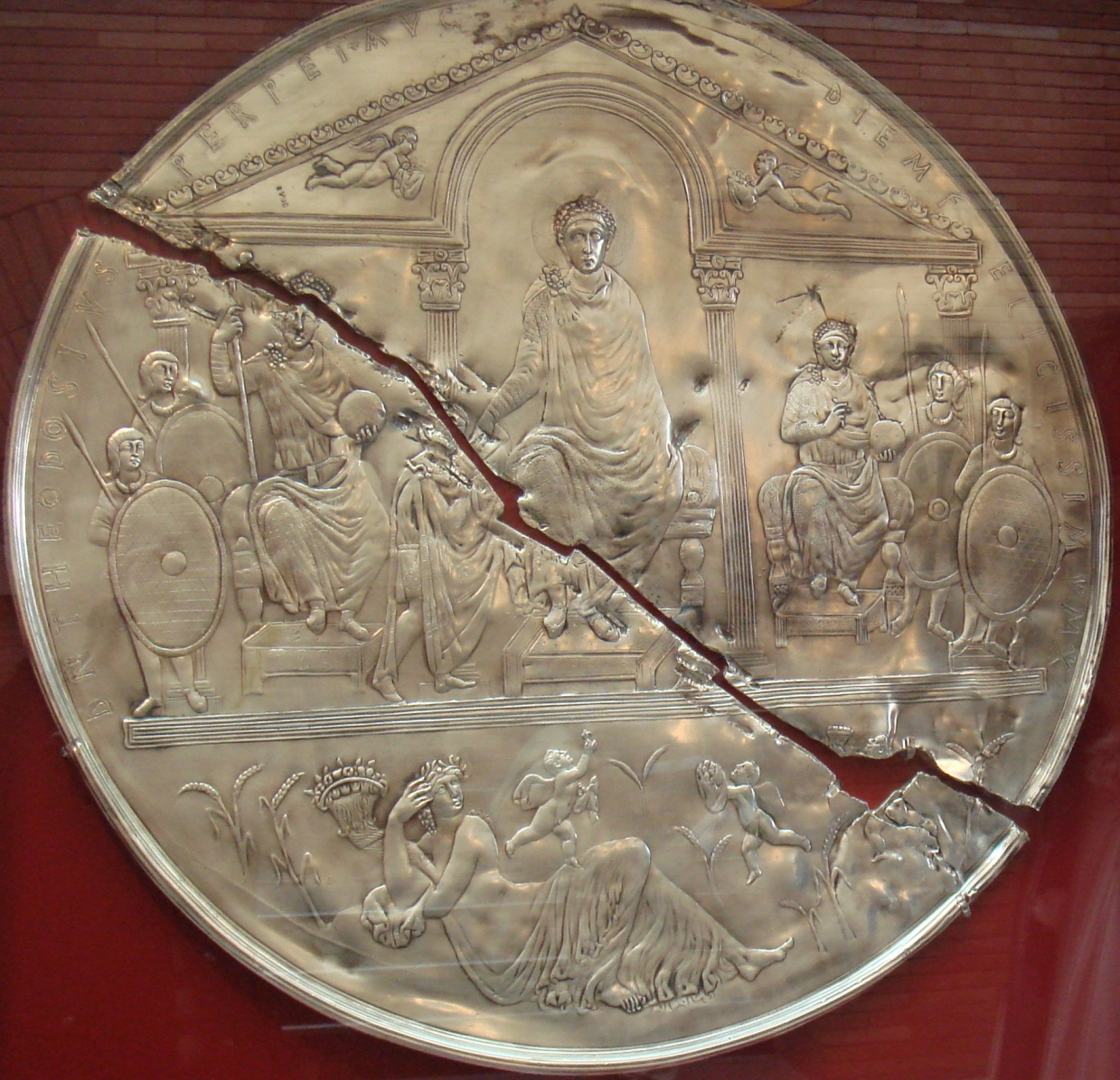 Réplica del Missorium de Teodosio en el Museo Nacional de Arte Romano, Mérida